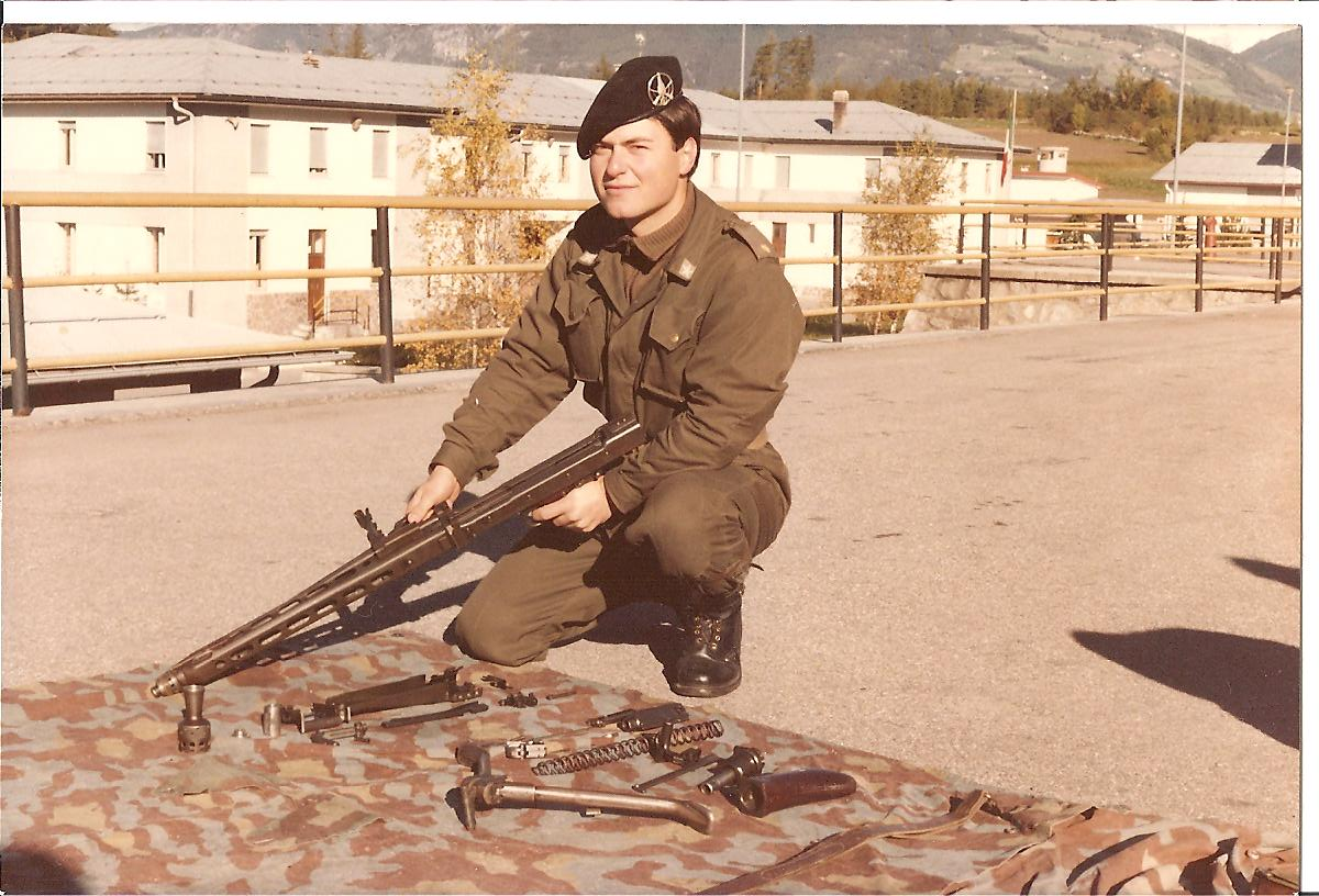 Caserma "Ruazzi" 1980. Addestramento con fucile mitragliatore Beretta MG 42/59